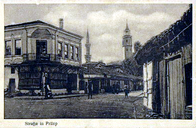 Улица в Прилеп в края на 19 - началото на 20 век.